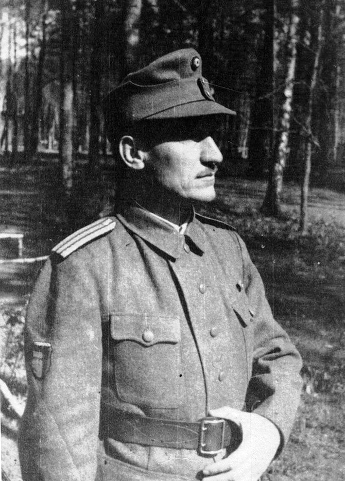 გენერალი შალვა მაღლაკელიძე